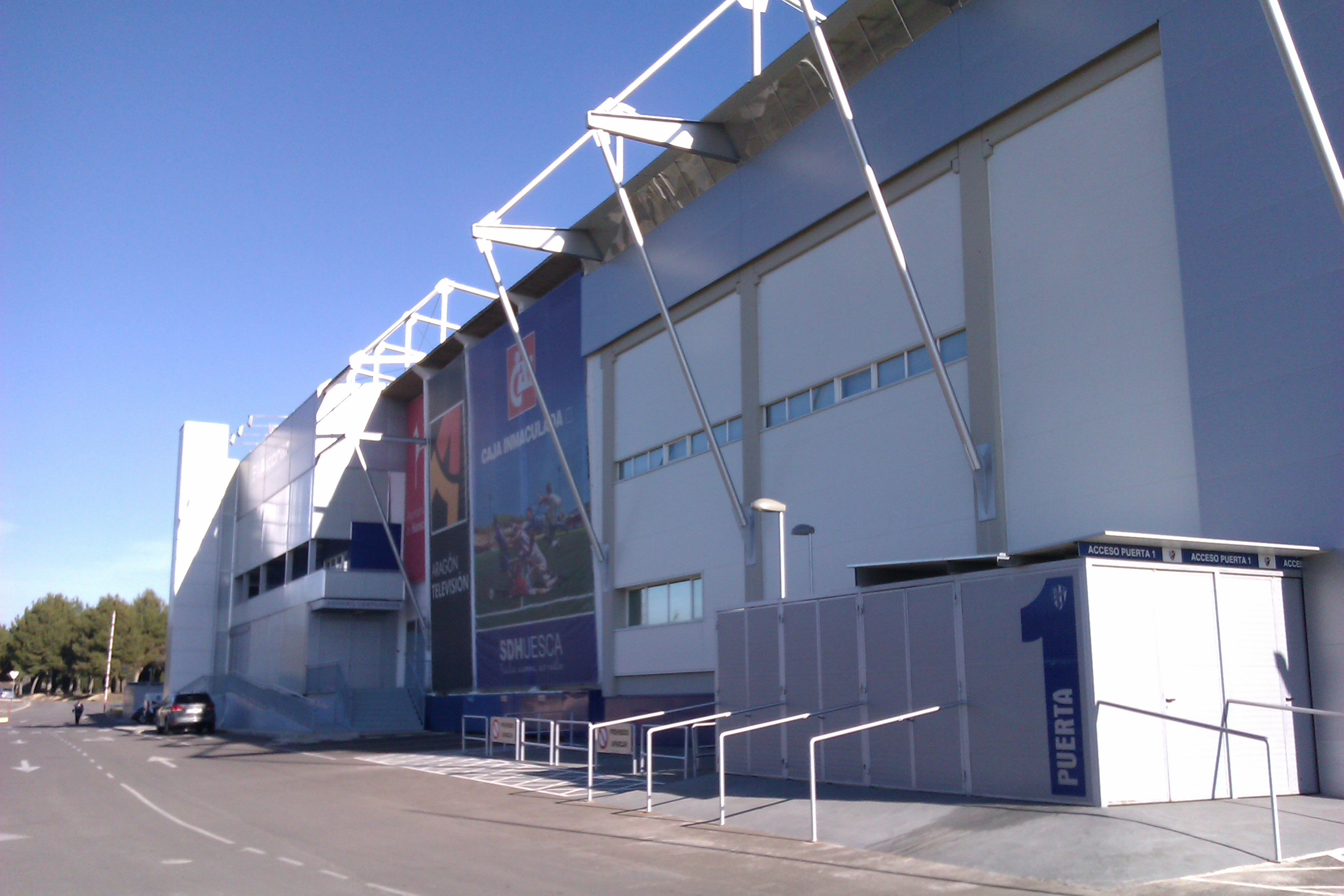 Aragonés: Estadio de l'Alcoraz, Uesca